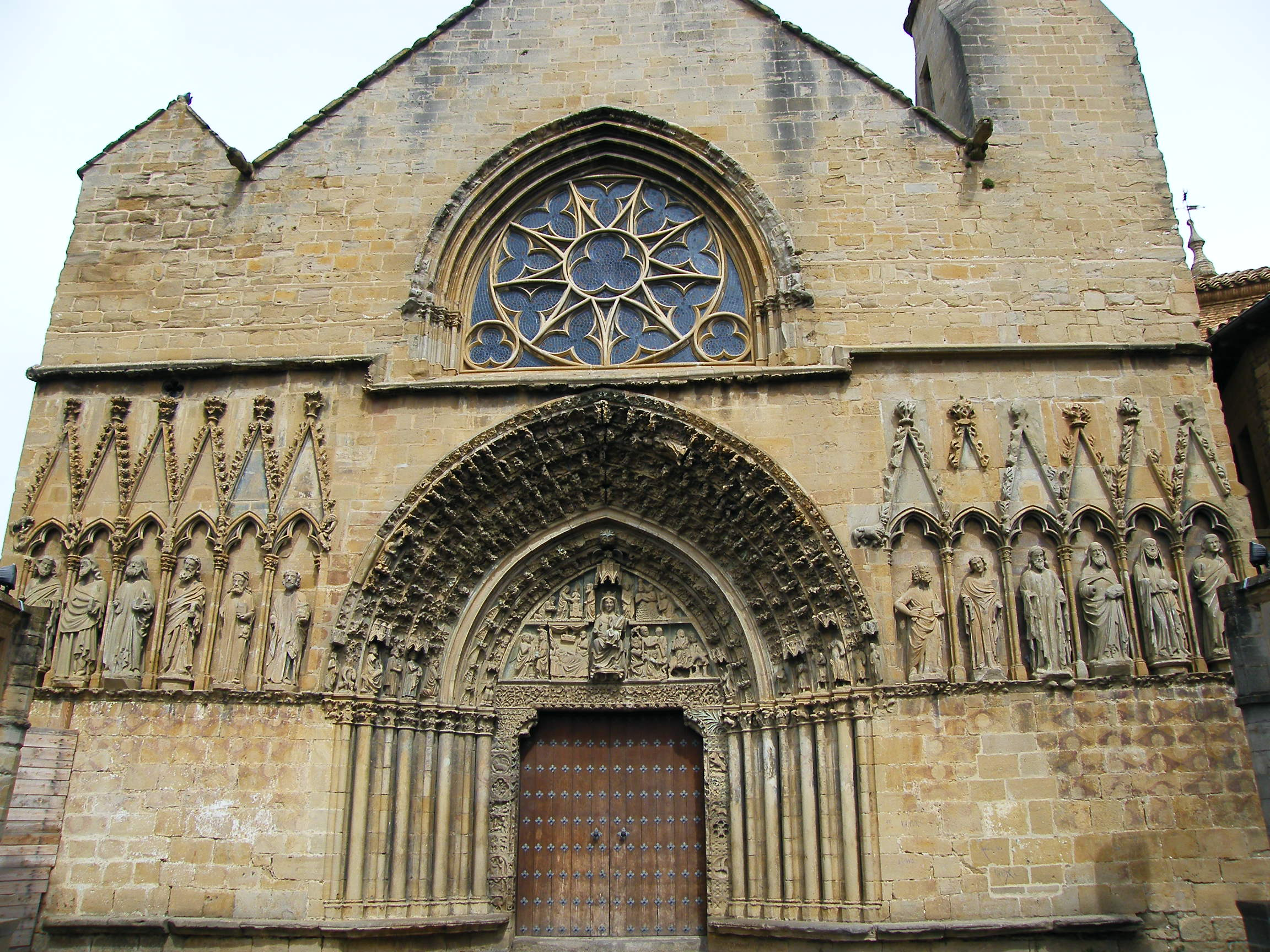 Vista general de la portada